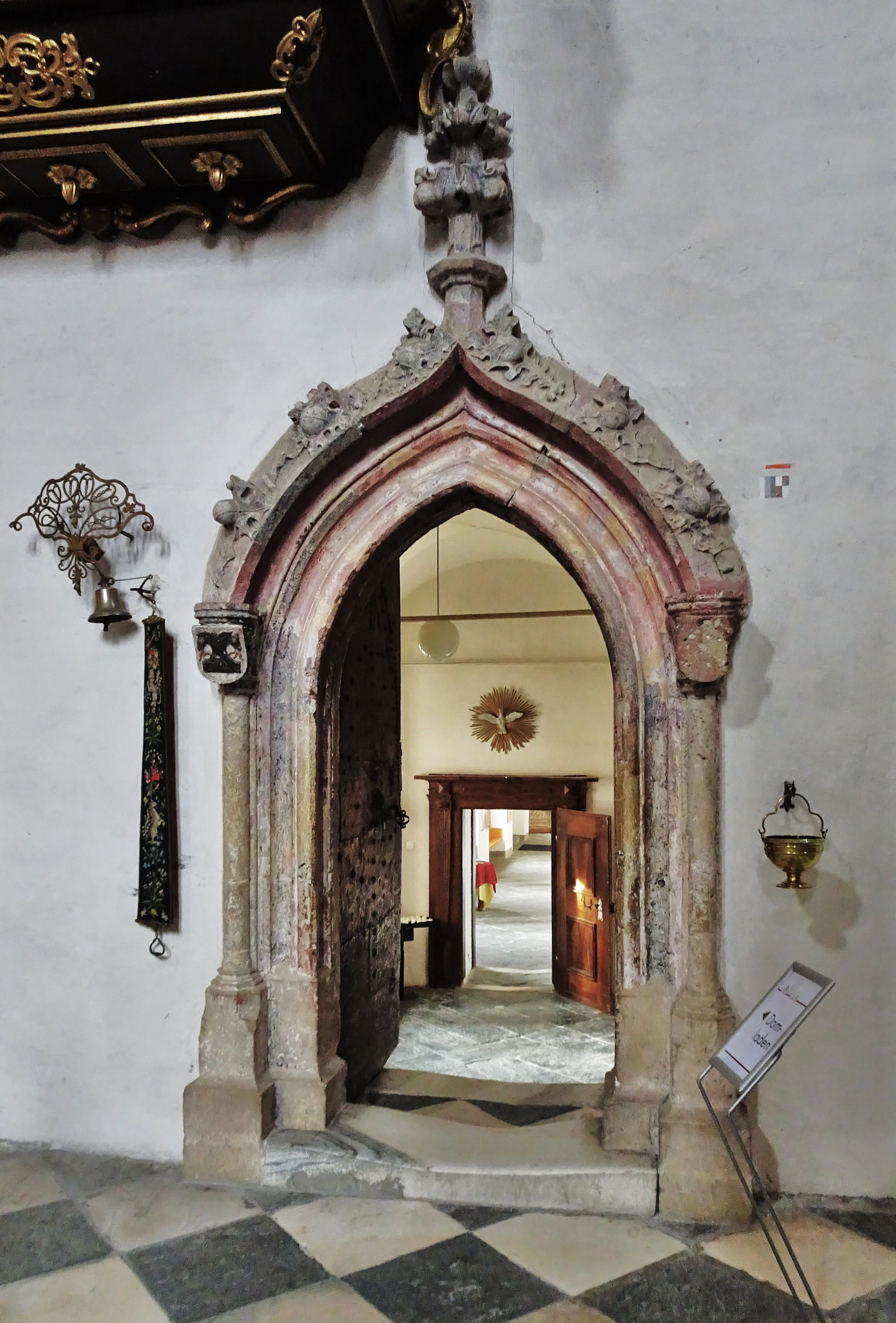 Dom zu Gurk, Sakristeiportal